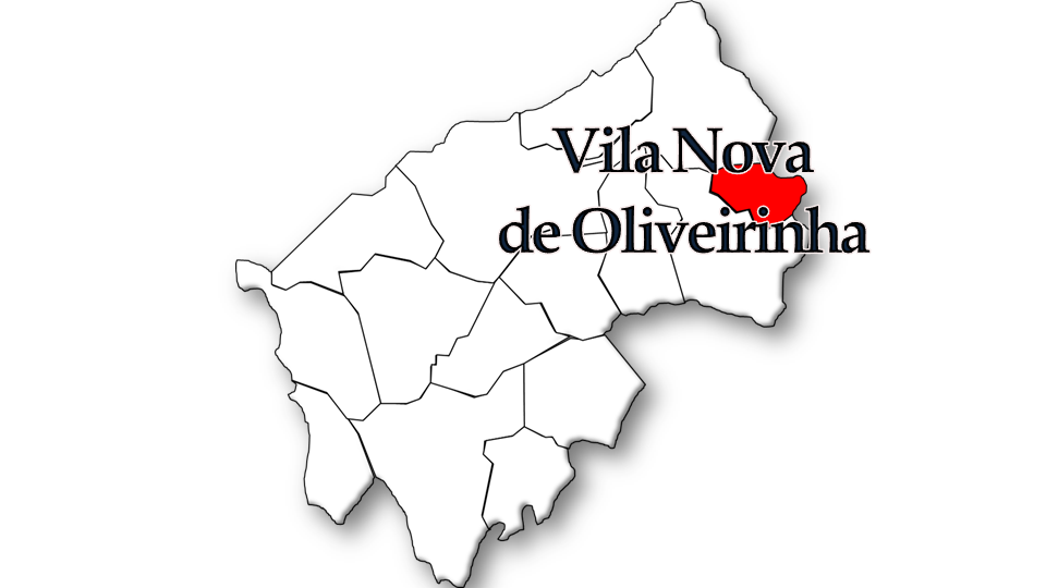 População